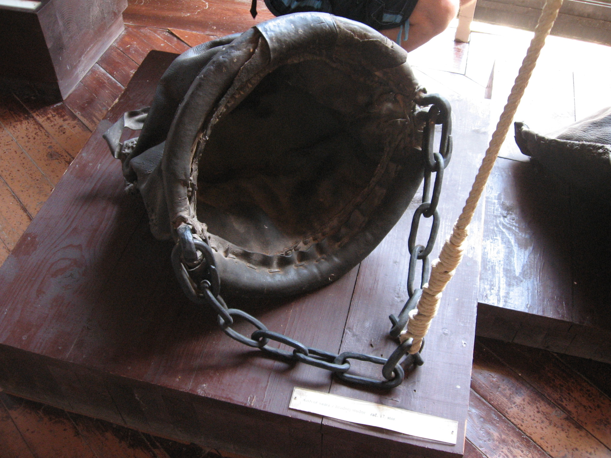 Krásna Hôrka